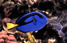 Dory di kehidupan nyata